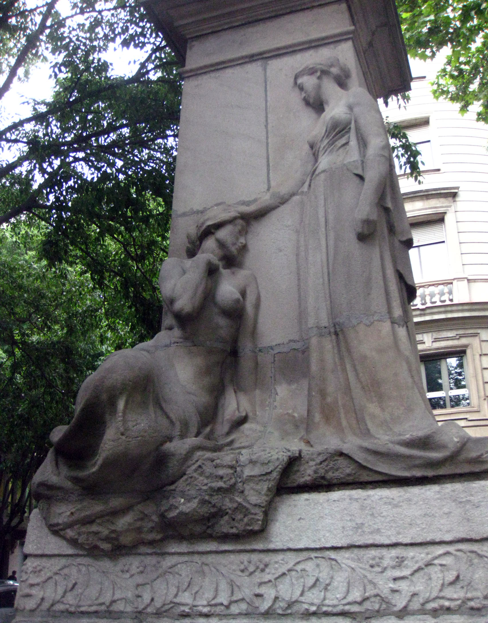 A Rafael Casanova: Al·legoria (Josep Llimona). Ronda de Sant Pere - c. Alí Bey (Barcelona)